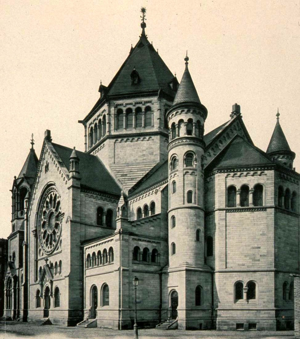 Strasbourg synagogue quai Kléber vue façade 1898-1940